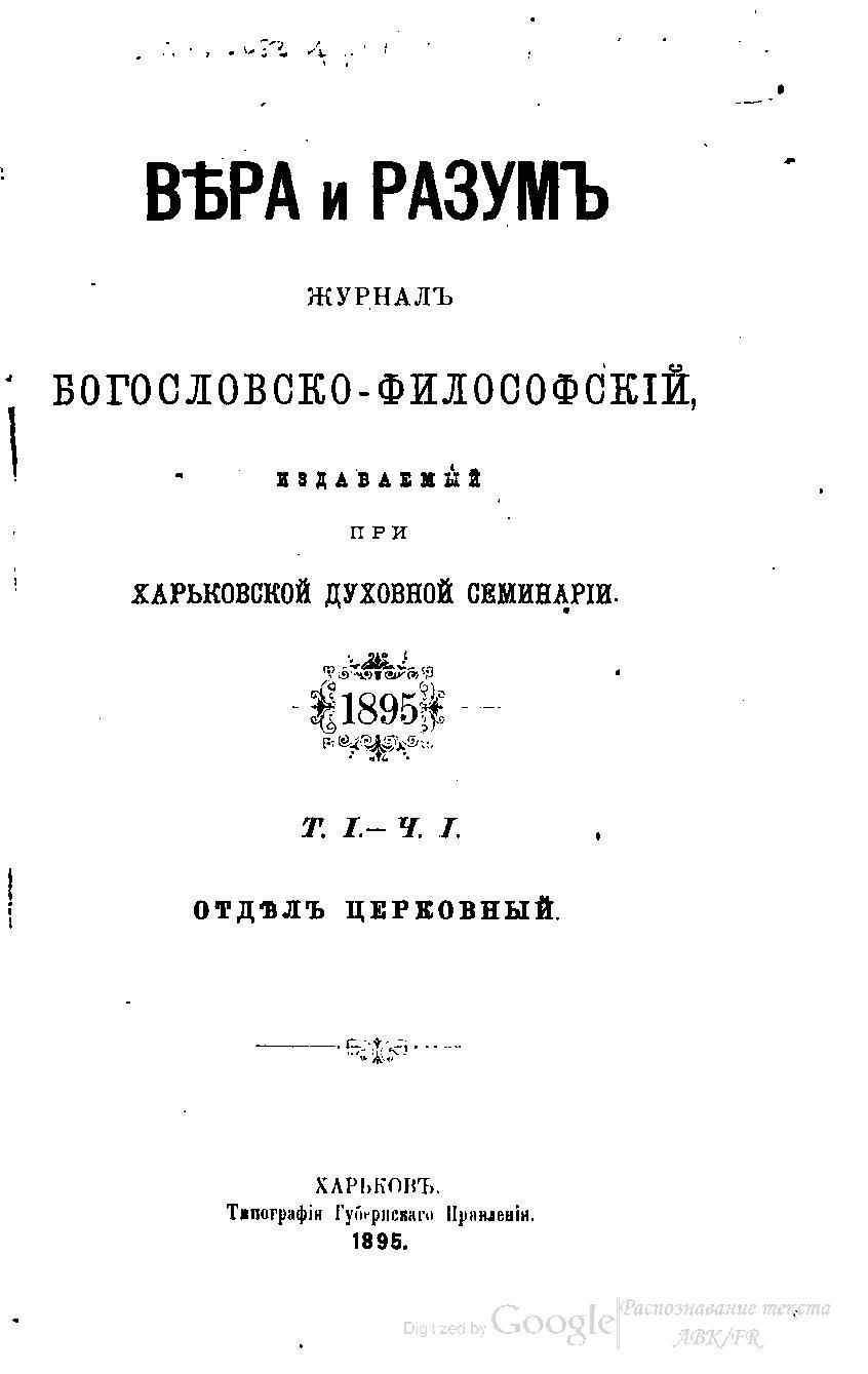 Вера и разум. 1895. Том 1